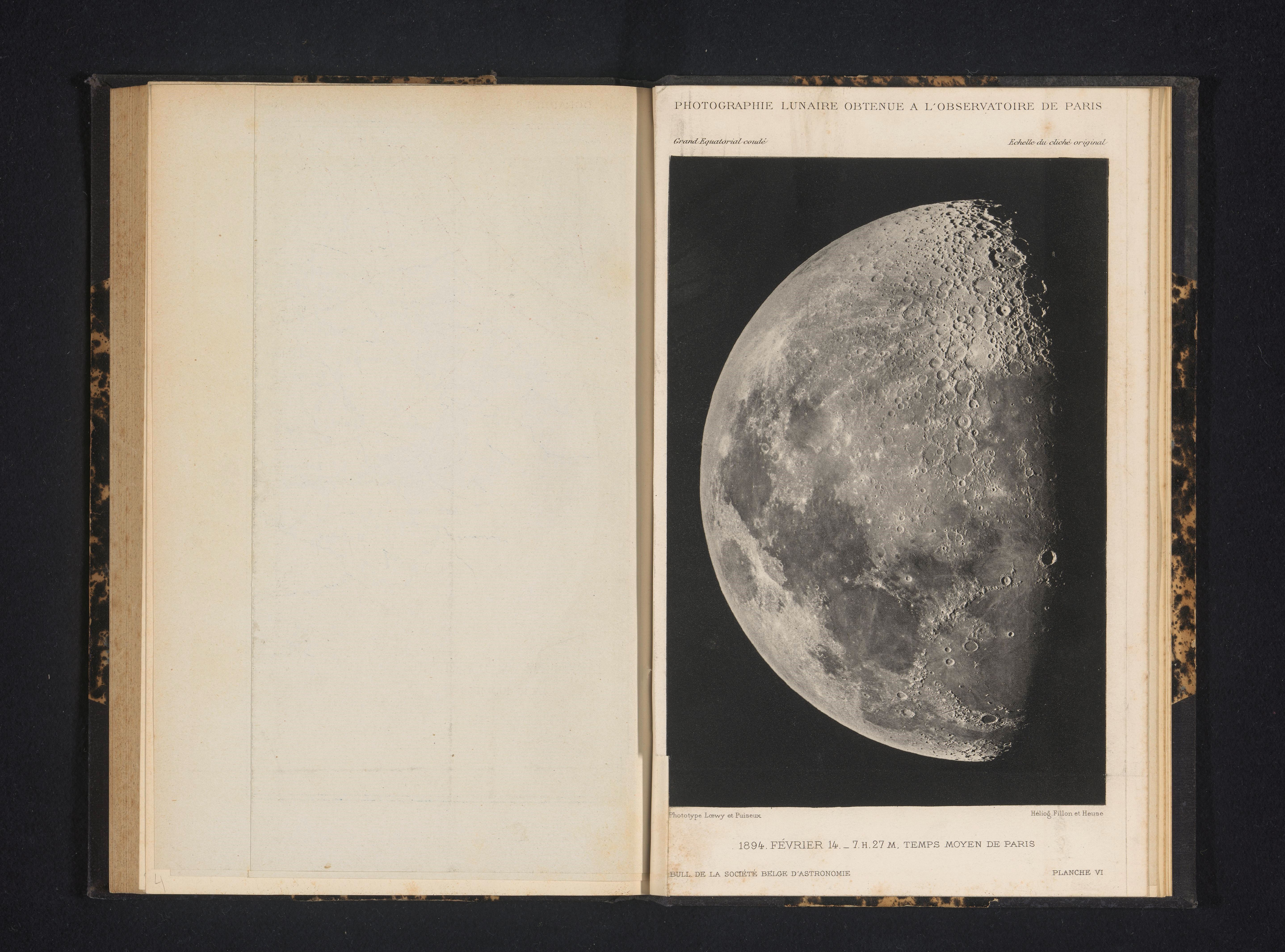 IdentificatieTitel(s): Gezicht op de maanPhotographie lunaire obtenue a l'observatoire de Paris (titel op object)Objecttype: fotomechanische afdruk bladzijde Objectnummer: RP-F-2001-7-1347A-5Opschriften / Merken: opschrift, recto, gedrukt: ‘Grand Equatorial coudé Echelle du cliché original’opschrift, recto, gedrukt: ‘1894. Février 14. _ 7.H. 27M. Temps Moyen de Paris’VervaardigingVervaardiger: vervaardiger: Loewy et Puiseux (vermeld op object)vervaardiger: Maurice Loewy (vermeld op object)vervaardiger: Pierre Henri Puiseux (vermeld op object)vervaardiger: Fillon & Heuse (vermeld op object)Datering: 14-feb-1894 - in of voor 1896Materiaal: papier Techniek: heliogravureAfmetingen: prent: h 193 mm × b 131 mmToelichtingPrent negen pagina's na pagina 272.OnderwerpWat: de maan als hemellichaamVerwerving en rechtenCredit line: Aankoop met steun van de Mondriaan Stichting, het Prins Bernhard Cultuurfonds, het VSBfonds, het Paul Huf Fonds/Rijksmuseum Fonds en het Egbert KunstfondsVerwerving: aankoop 2001Copyright: Publiek domein